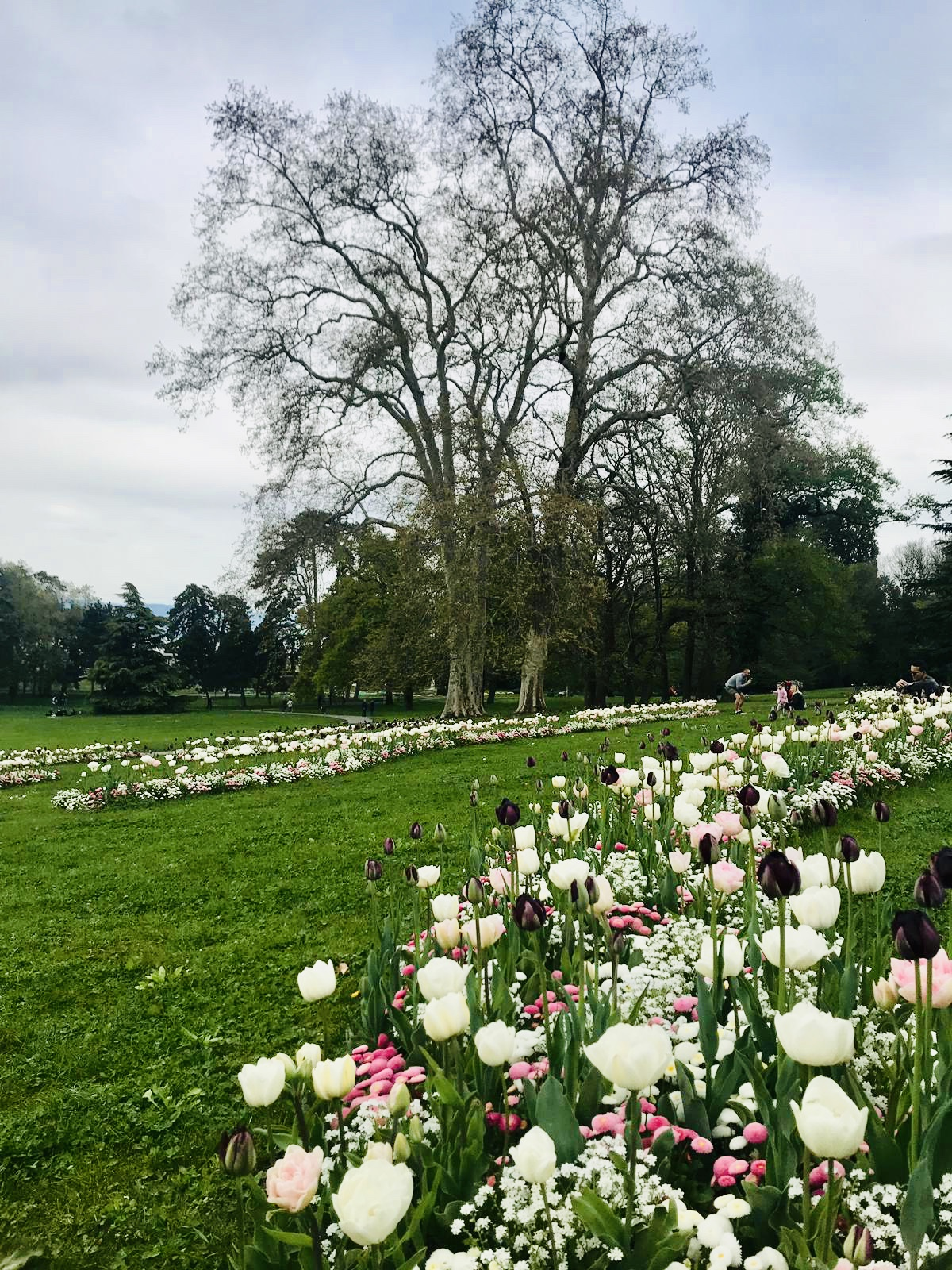 Jardin fleuri devant la Villa La Grange